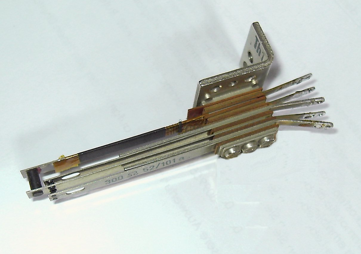 Ein Bimetallrelais (Thermorelais), wie es in analogen Telefonanlagen eingesetzt wurde